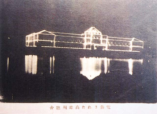 中文（台灣）: 佈設燈飾的高雄州廳，將夜裡的愛河染成金色的一片，攝於西元1930年（昭和5年）。